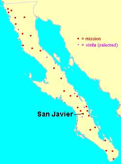 Mapa de la ruta de las misiones